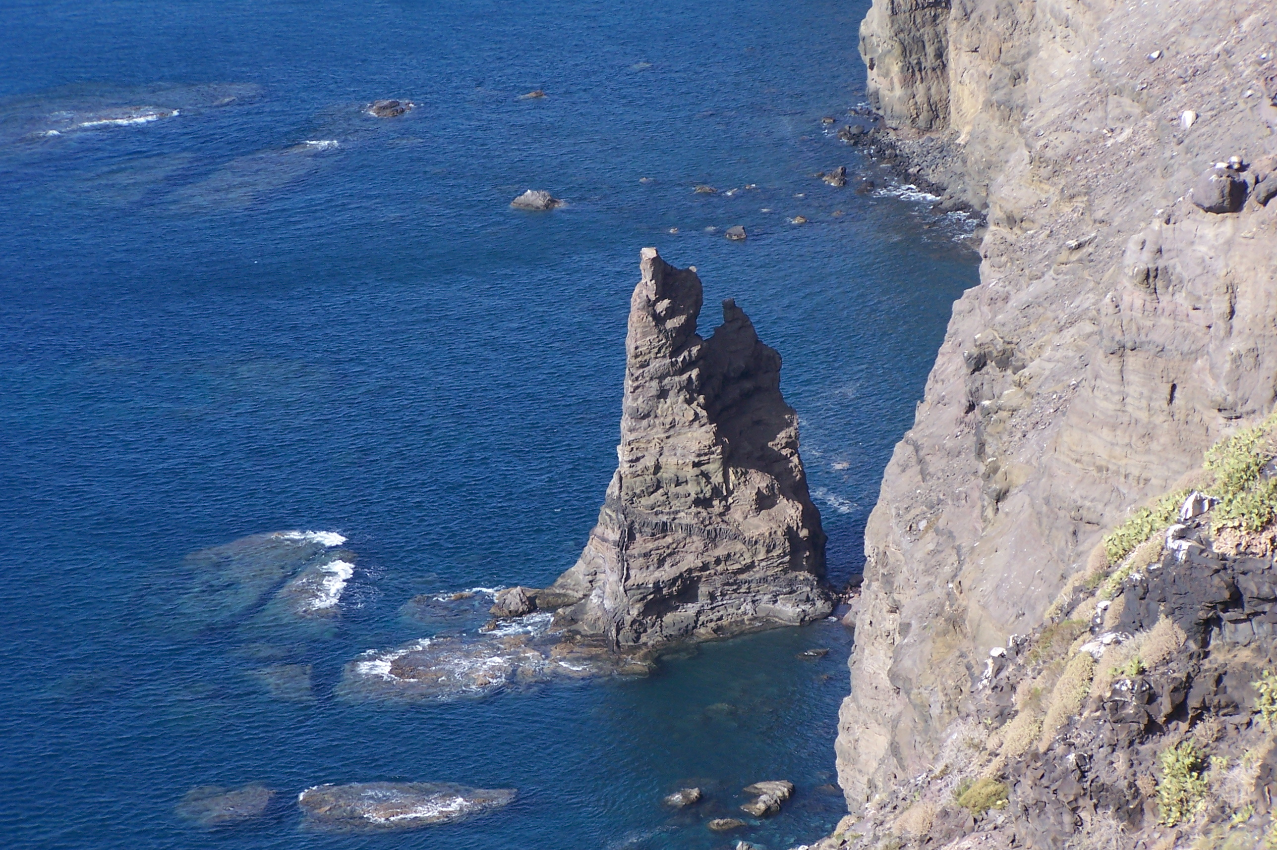 Fotograf: Dr. Egbert Kainzbauer Das Bild zeigt den Dedo de Dios am 5.12.2005, nachdem der Tropensturm Delta die Spitze abgebrochen hat. // Imagen del Roque Partido, conocido como "El Dedo de Dios", el 5.12.2005, después de la Tormenta Tropical "Delta". Vgl. Bild:Dedo de Dios am 30.09.2005.jpg